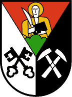 Bartholomäberg, Vorarlberg: Ein durch Deichselschnitt geteilter Schild, vorne in Silber schwarze gekreuzte Schlüssel, hinten in Schwarz silberne gekreuzte Hämmer und oben in Rot auf grünem Dreiberg goldener hl. Bartholomäus mit Heiligenschein, der in der rechten Hand ein silbernes Messer, in der linken ein Gebetbuch hält. (Verleihung: 17. August 1965)